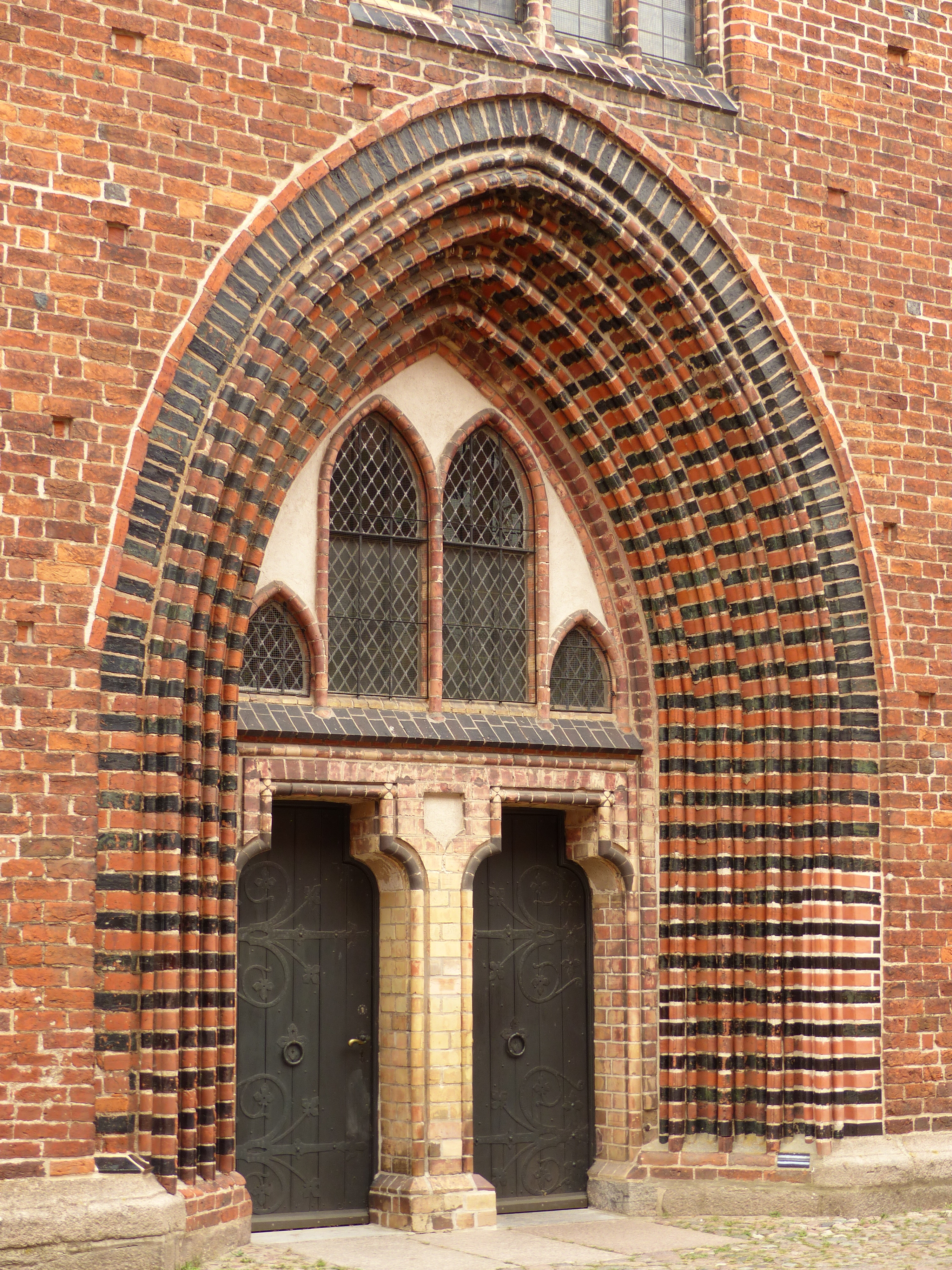 südwestliche Kapelle der Marienkirche in Güstrow